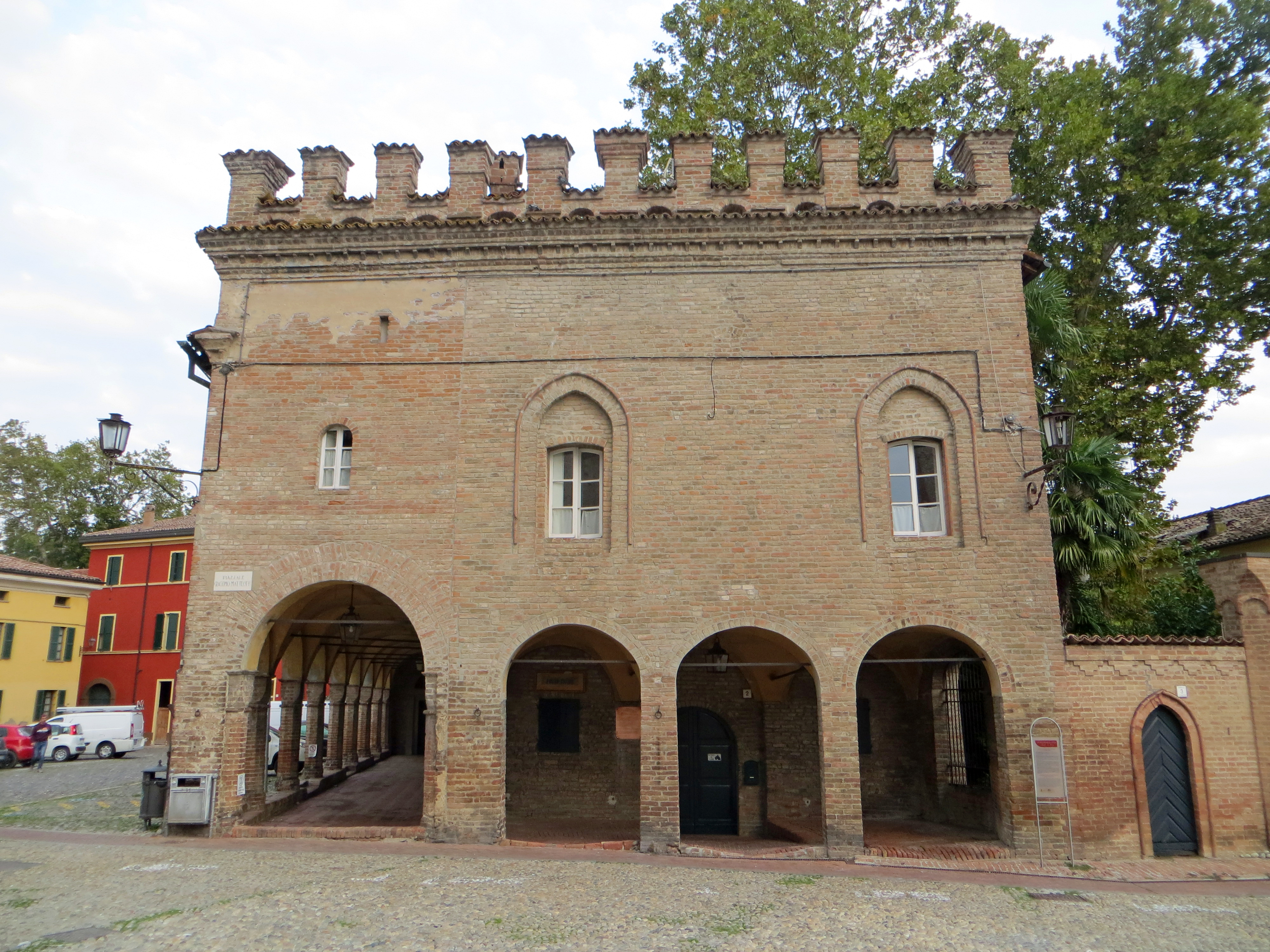 Scuderie Sanvitale (Fontanellato) - facciata est